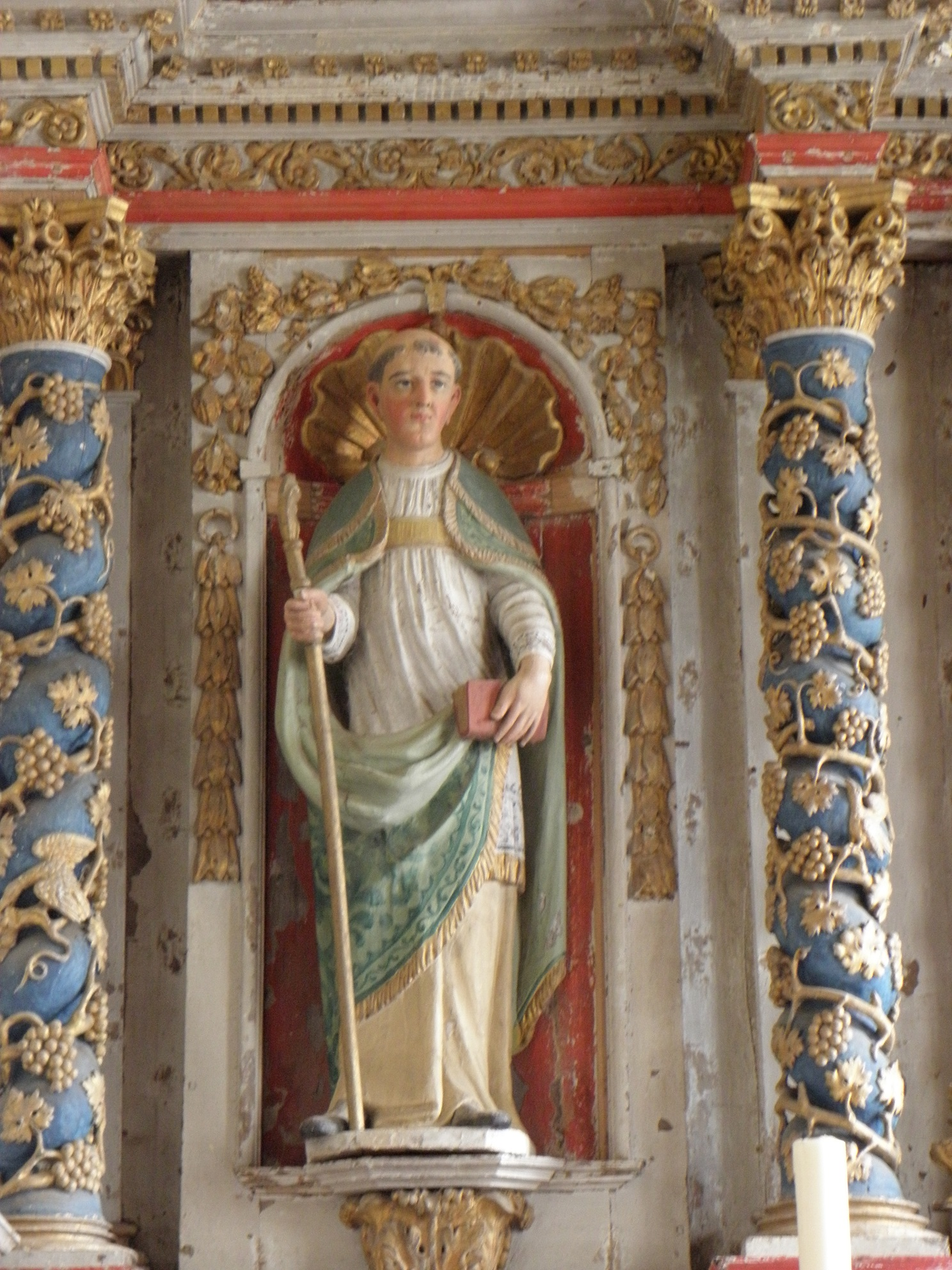 Intérieur de l'église Saint-Guénolé de Locquénolé (29). Retable du maître-autel. Statue de Saint-Guénolé.